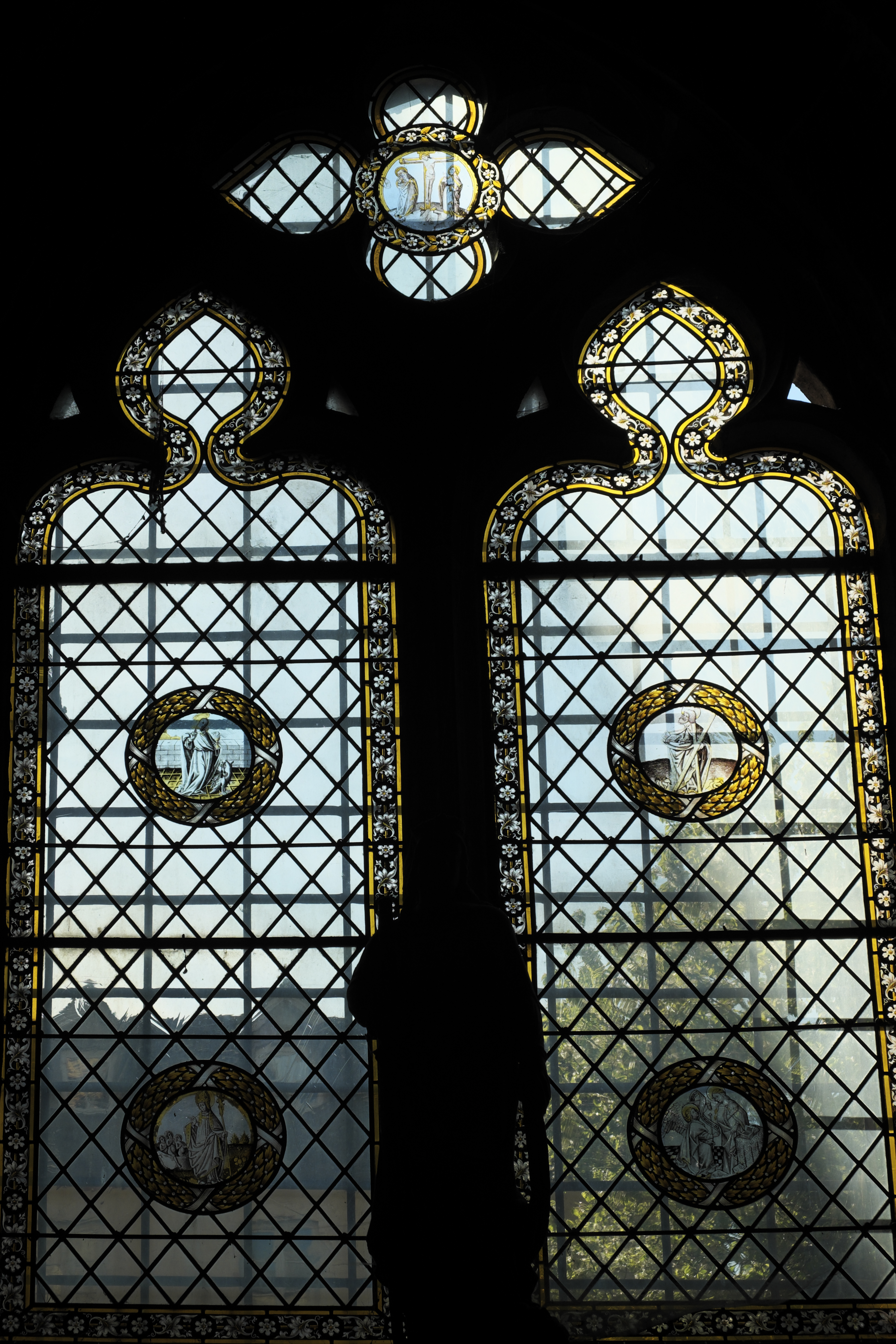 Katholische Pfarrkirche, ehemalige Stiftskirche, Notre-Dame in Beaune im Département Côte-d’Or (Bourgogne-Franche-Comté/Frankreich), Bleiglasfenster